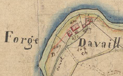 La Farga d'Avell de Sant Llorenç de Cerdans en el Cadastre napoleònic del 1812 (Arxius Departamentals dels Pirineus Orientals)